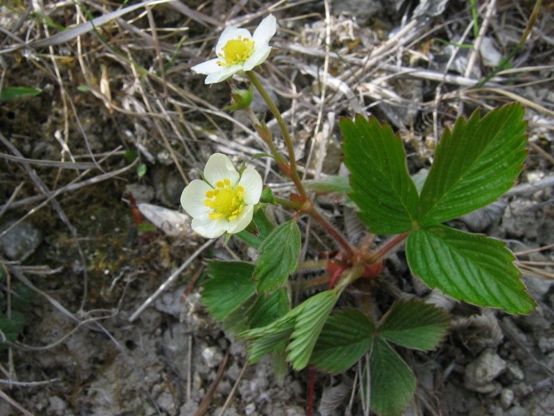 Hügel-Erdbeere Fragaria viridis, Rügen